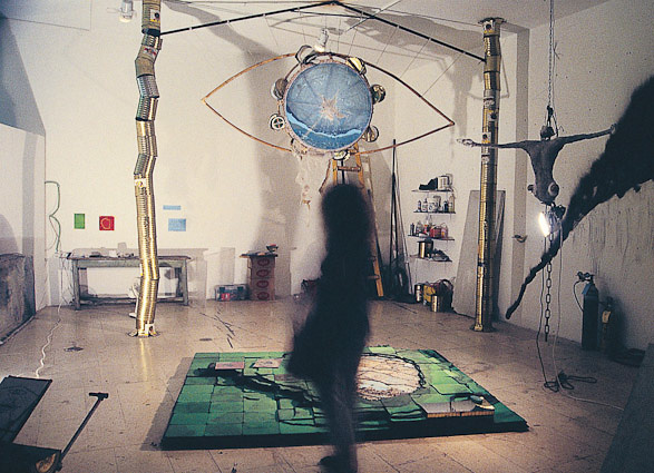 installation